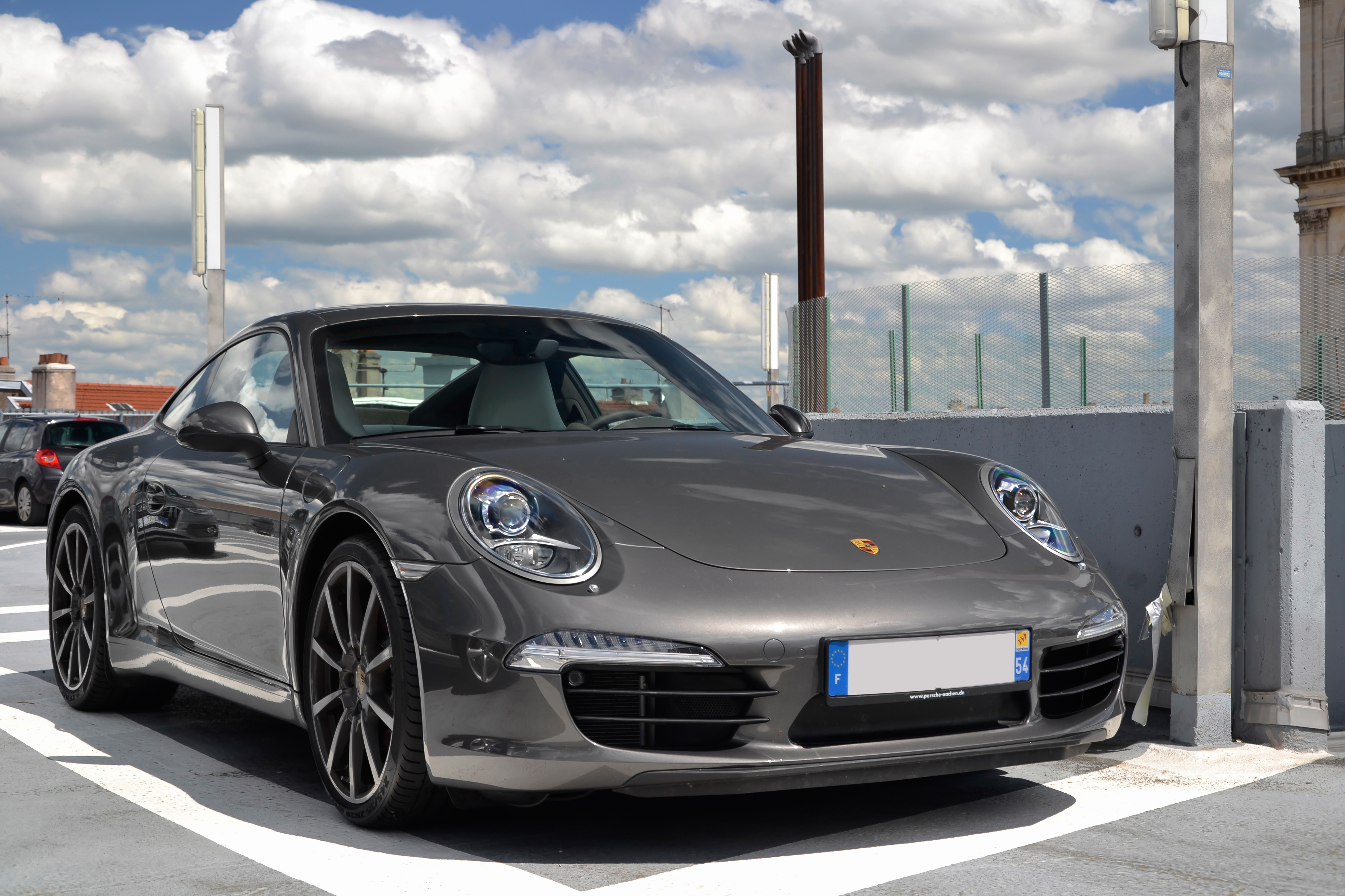 Porsche 911 Carrera S